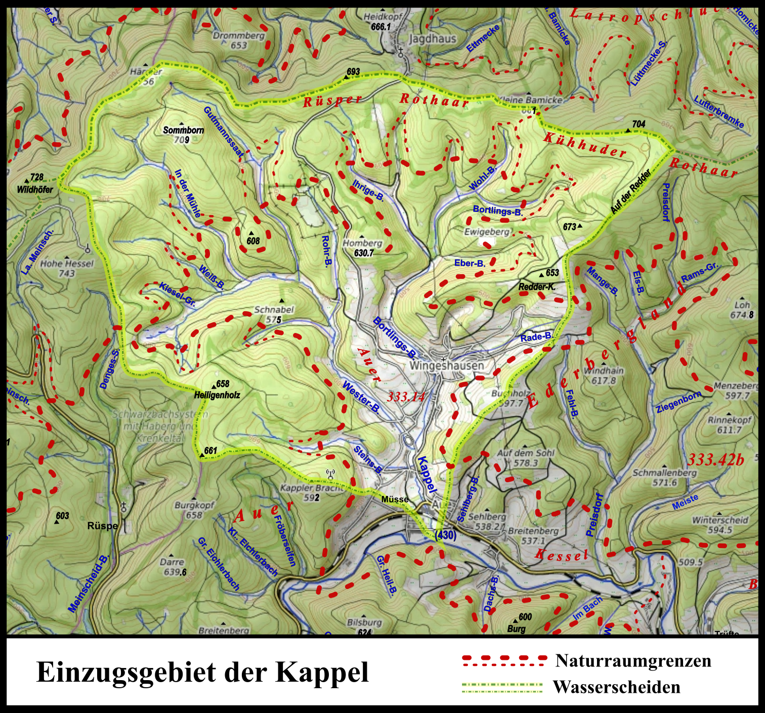 Karte des fächerförmigen Einzugsgebiets der Kappel, das den Auer Kessel um Wingeshausen und Aue (Bad Berleburg) prägt. Im Norden Rüsper und Kühhuder Rothaar, in Südwesten und Südosten Teile des Auer Ederberglands